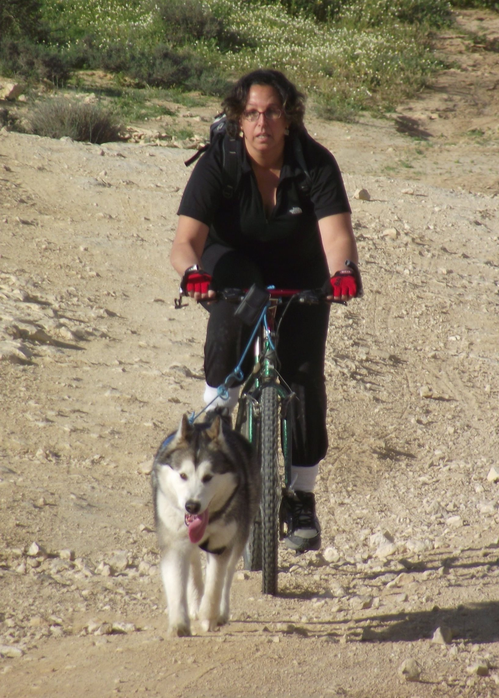 כלבת אלסקן מלמוט מושכת אופניים ורוכבת בנחל הרועה שבנגב.